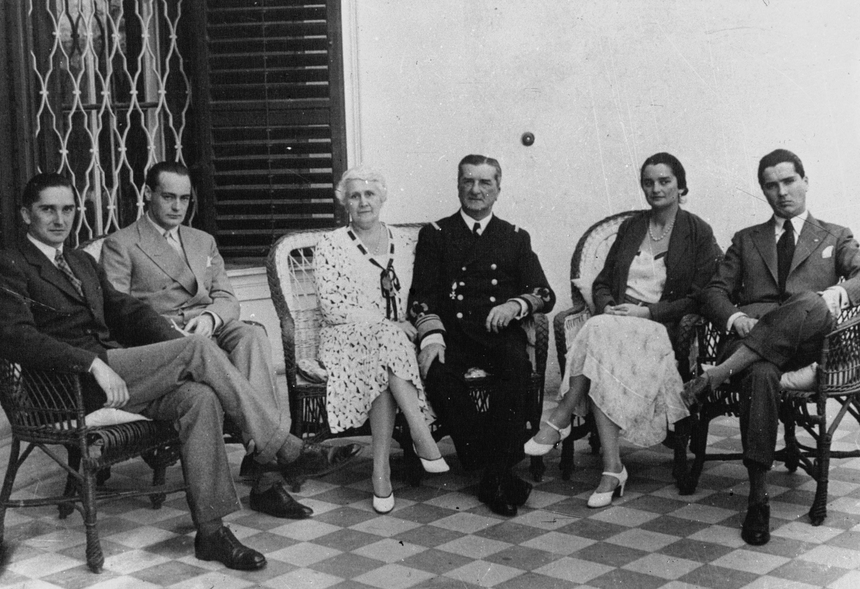 Le régent Horthy et sa famille : [photographie de presse] / Agence Meurisse